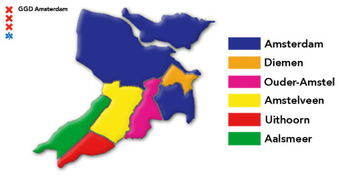 overzicht werkgebied GGD Amsterdam